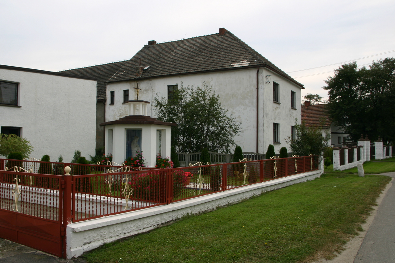 Nowa Wieś Prudnicka (dodatkowa nazwa w j. niem. Neudorf – wieś w Polsce położona w województwie opolskim, w powiecie prudnickim, w gminie Biała.